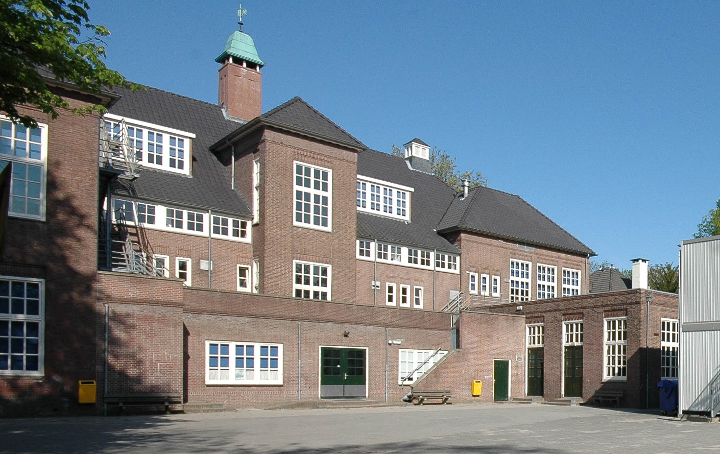 Basisschool Reigerlaan - achterzijde voor verbouwing